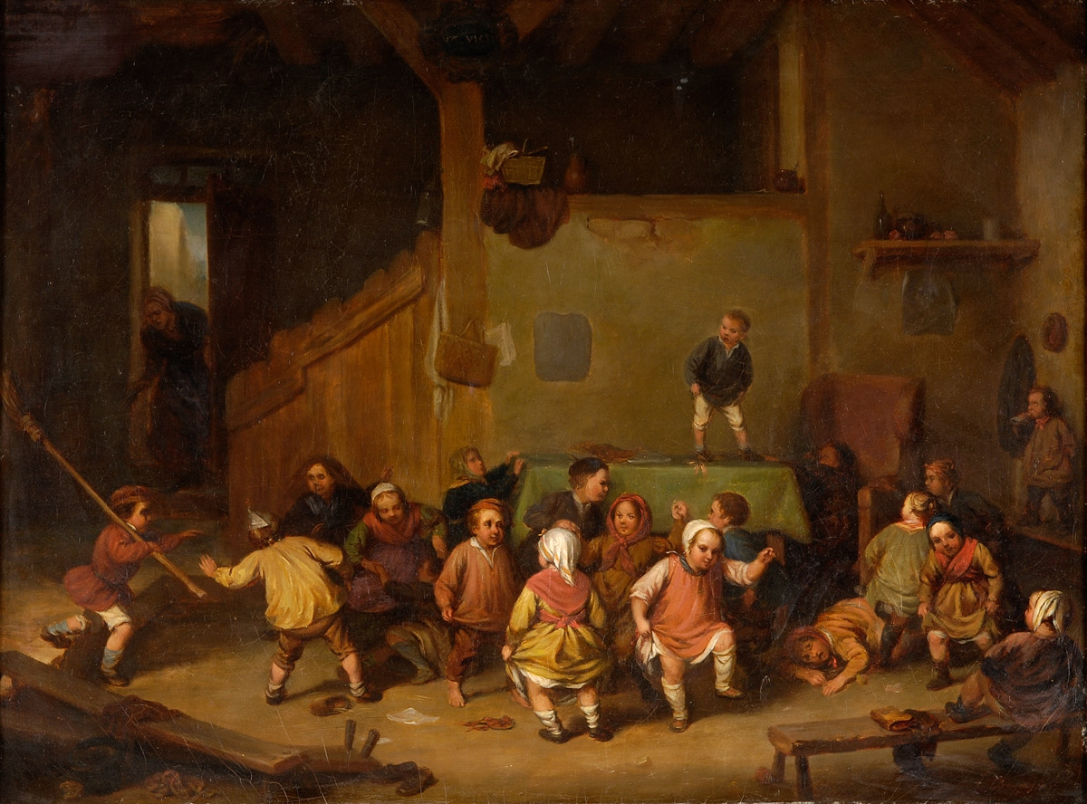 Die Dorfschule. Signiert. Öl auf Leinwand, 57 x 77 cm